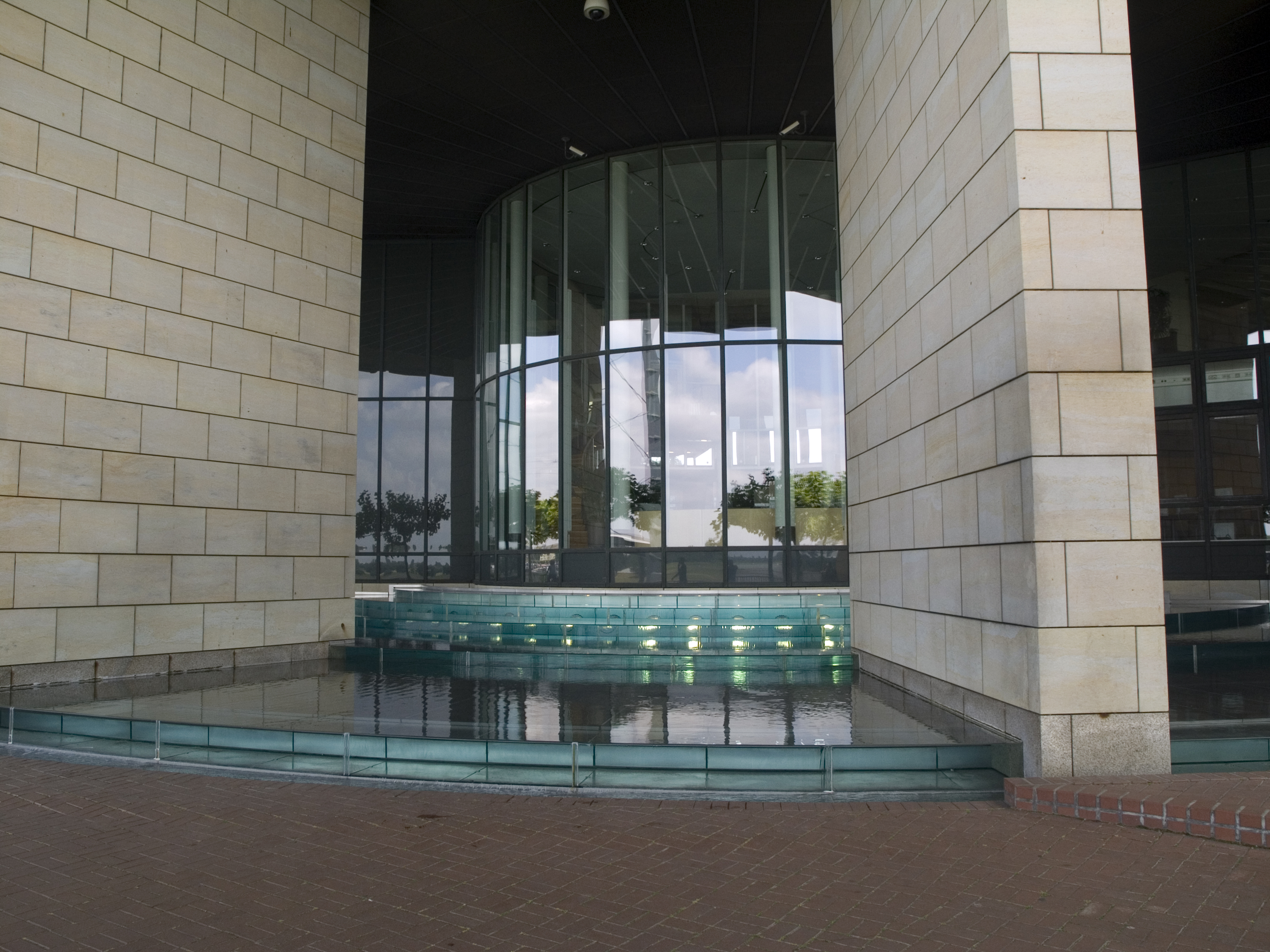 Северный Рейн-Вестфалия, Дюссельдорф – ландтаг СРВ